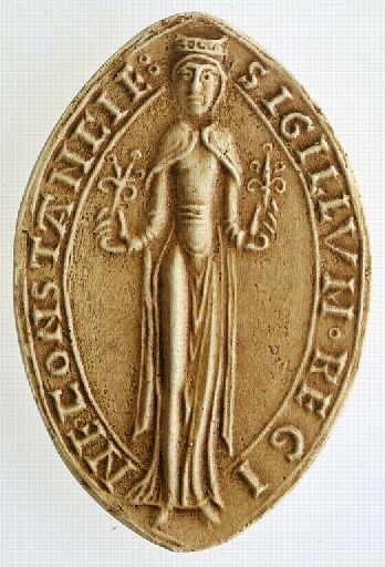 sceau de Constance de Castille, reine de France, seconde femme du roi Louis VII le Jeune